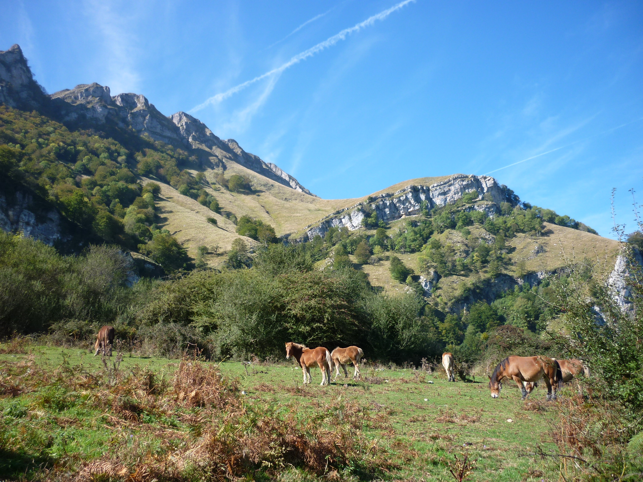 Vista de parte de las Malloas de Aralar, desde el camino que sube de Gaintza hasta el collado de Baratzail